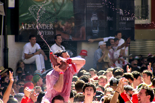 Chupinazo, Pamplona, 6 de julio